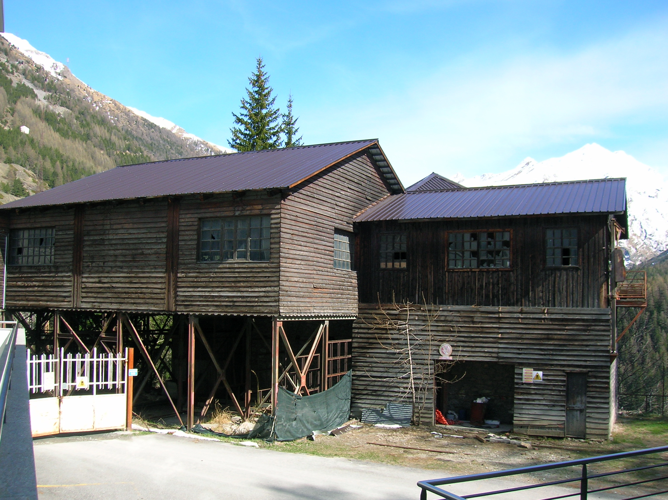 Villaggio Minatori e Centro Espositivo Alpinart – La miniera di Cogne This is a photo of a monument which is part of cultural heritage of Italy.